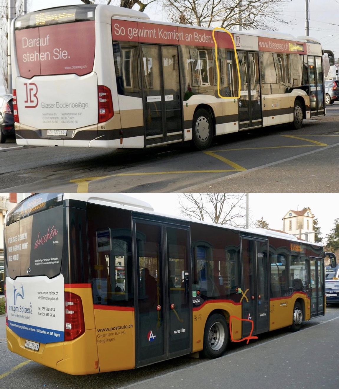 Unterschiede zwischen den C2 und C2 K 3 Türe